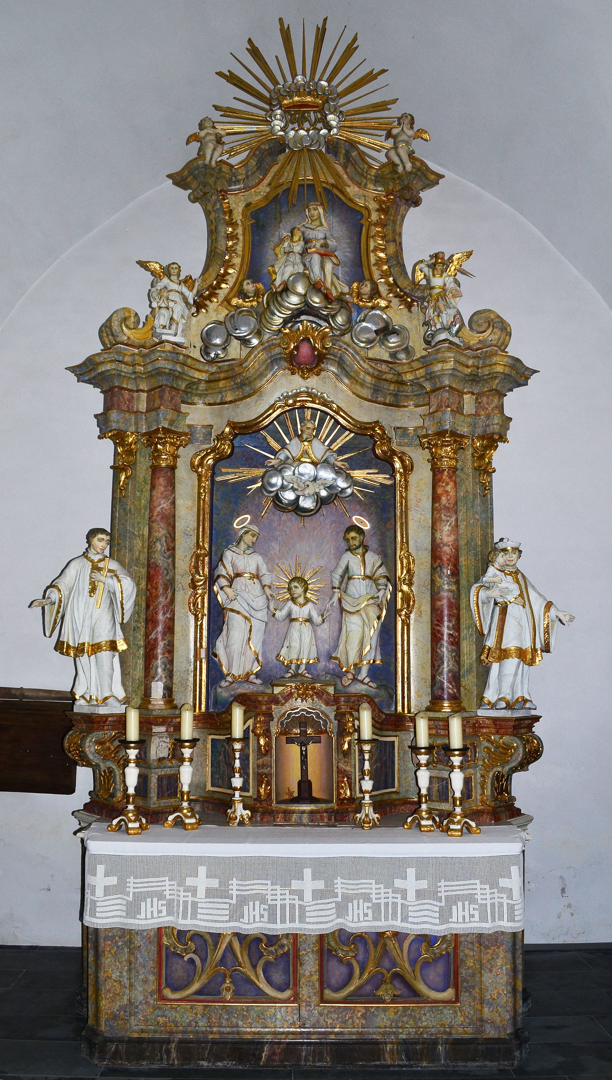 Brilon, Keffelker Kapelle, Barockaltar